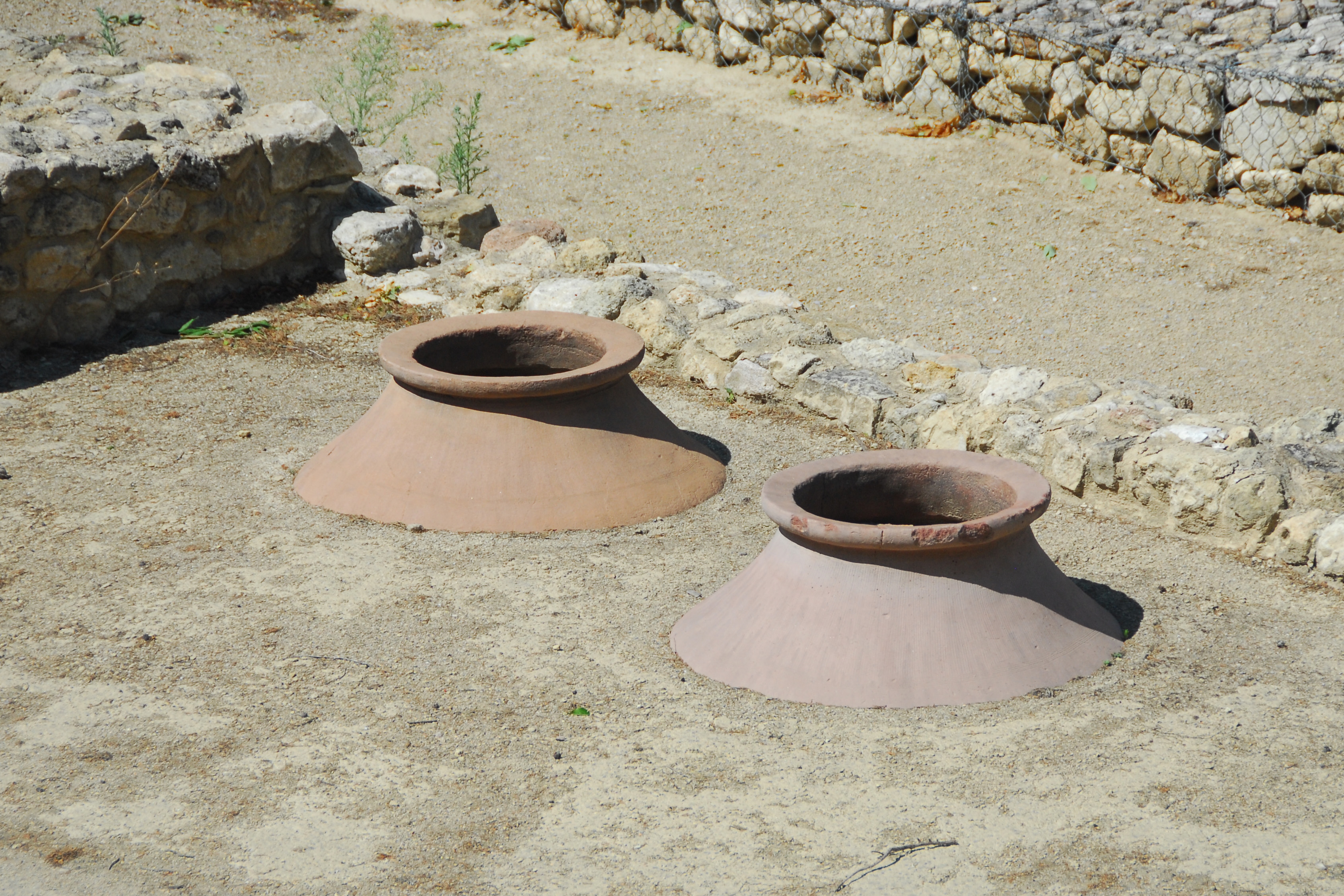 Oppidum d'Ensérune, Nordflanke, Haus mit 2 Dolia